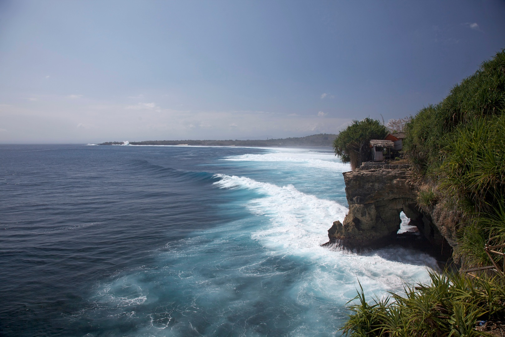 Bali: Nusa Ceningan